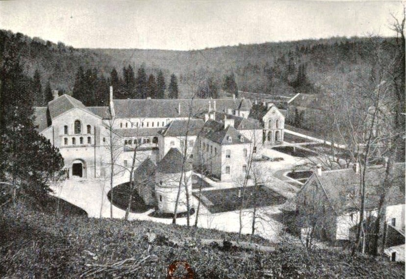 Abbaye de Fontenay (1926)